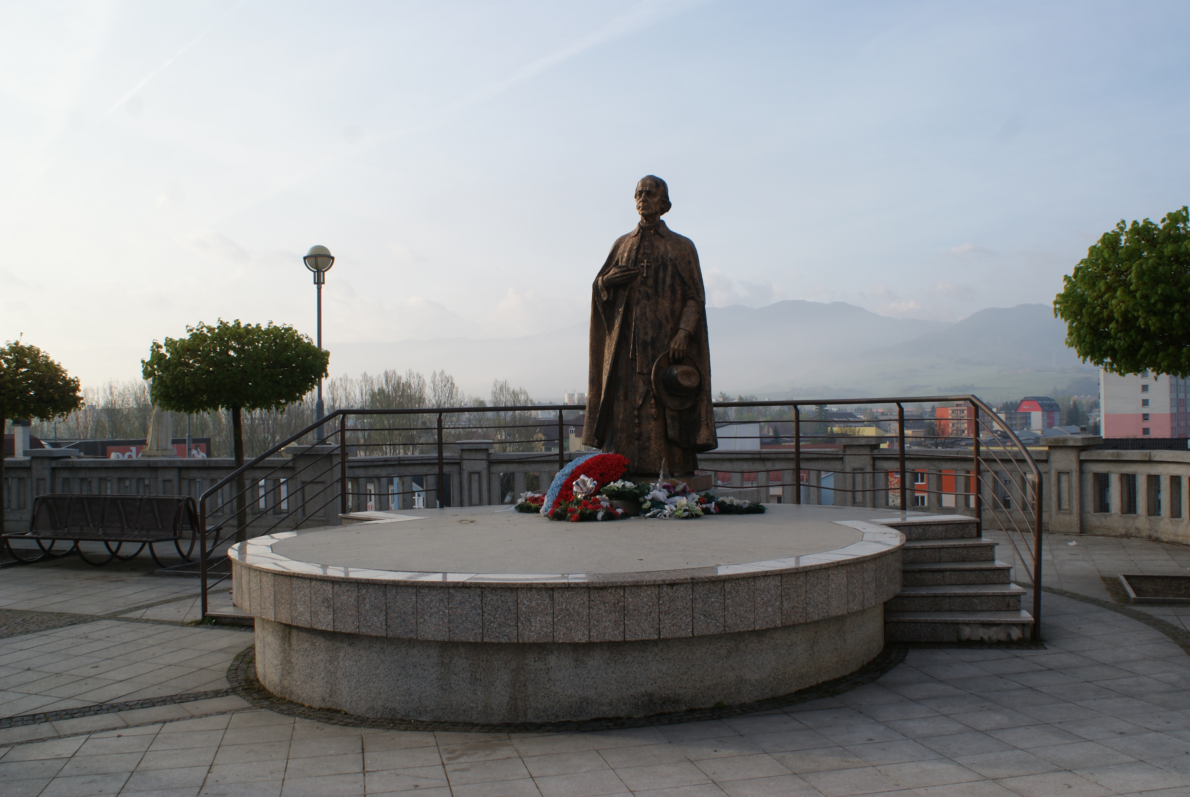 Ружомберок